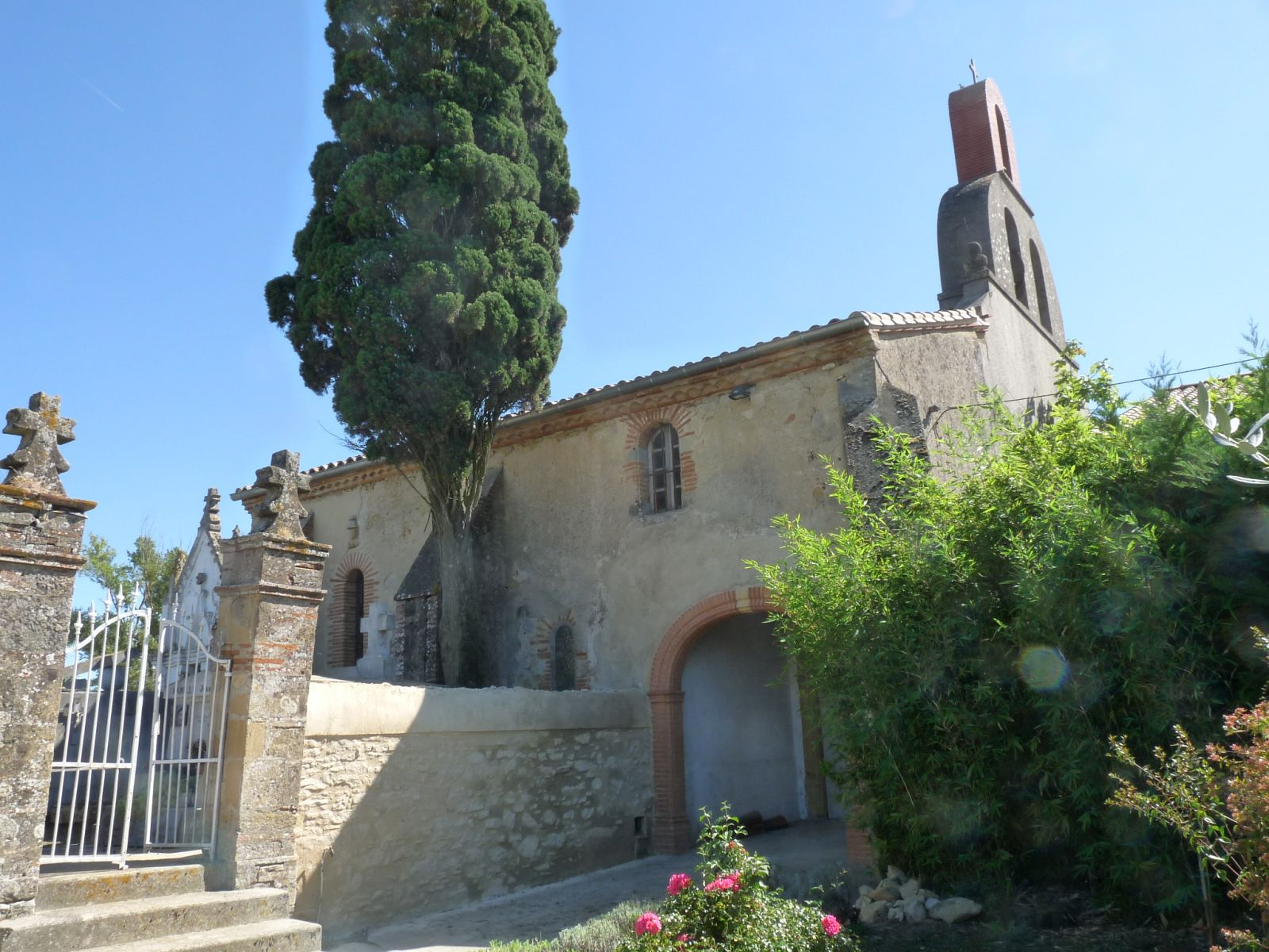 Eglise de Saint-Vincent, Haute-Garonne, France